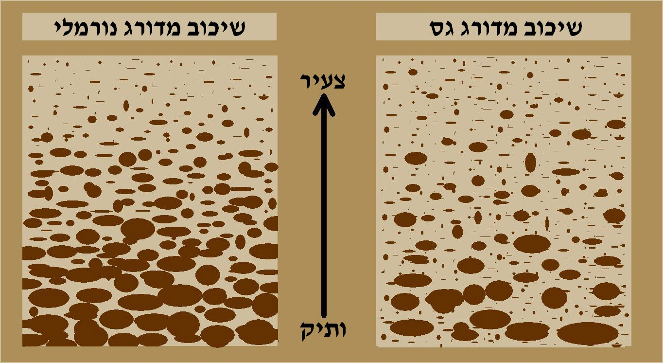 derivative of